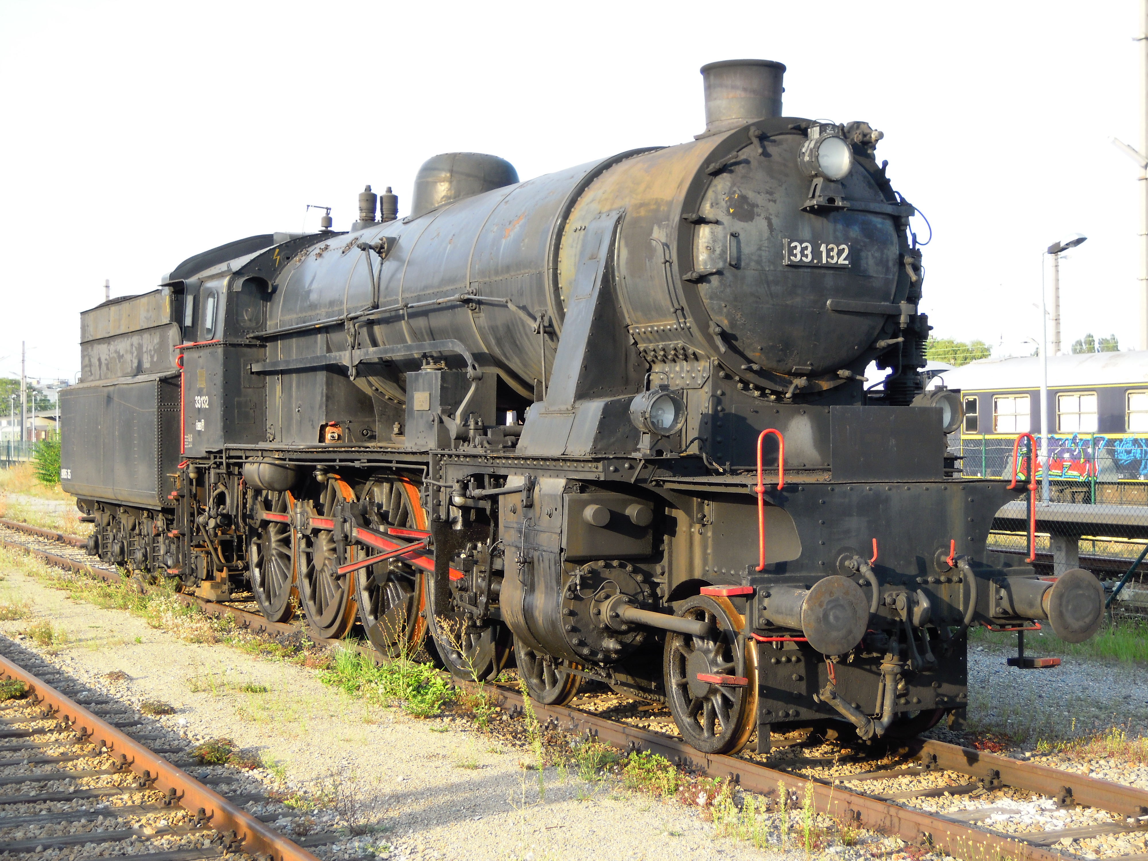 Locomotive à vapeur 33.132 (BBÖ Baureihe 113) construite en 1925, garée à Vienne (gare de Wien-Heiligenstadt).